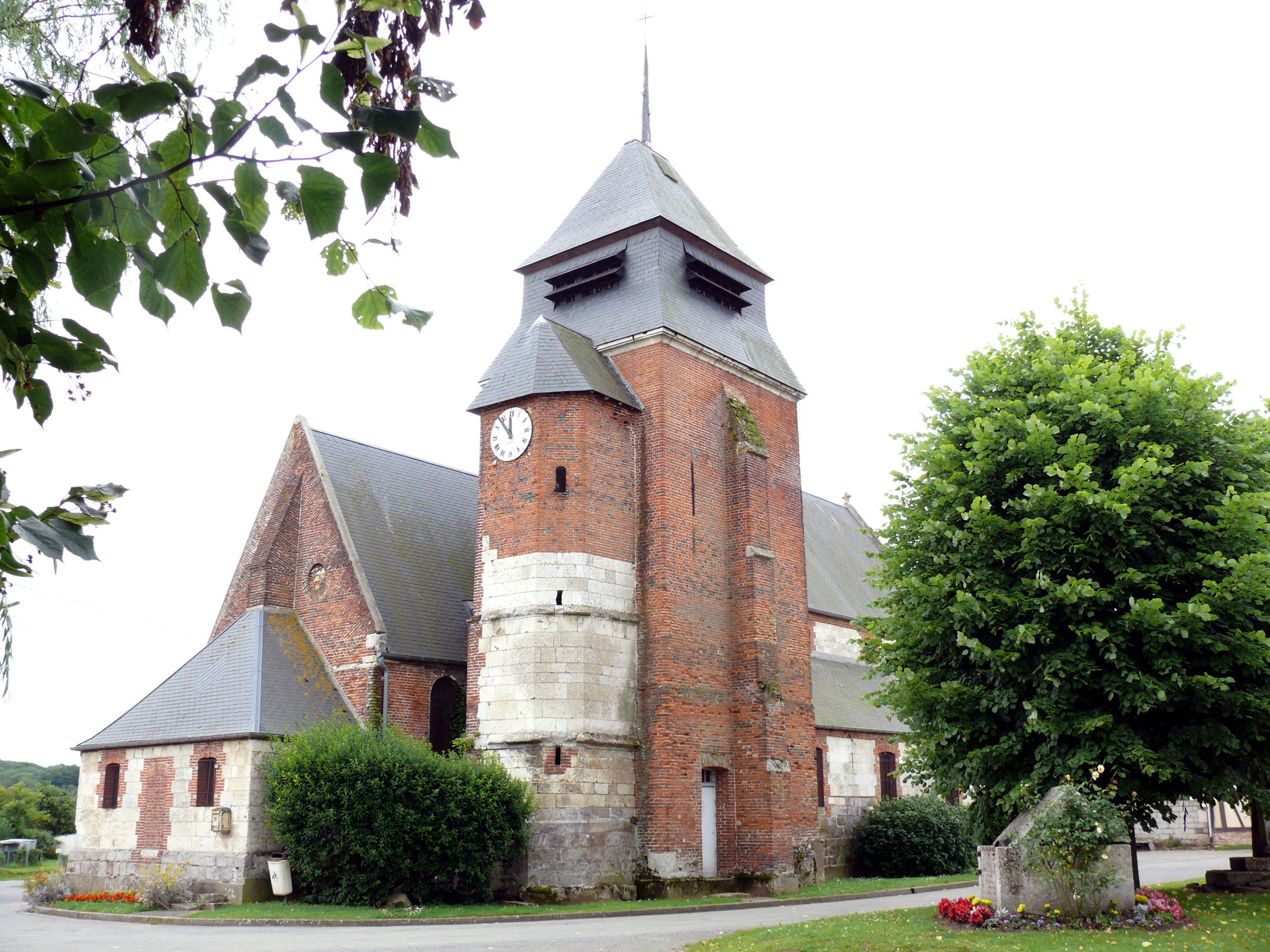 Hétomesnil : l'église Saint-Jean Baptiste